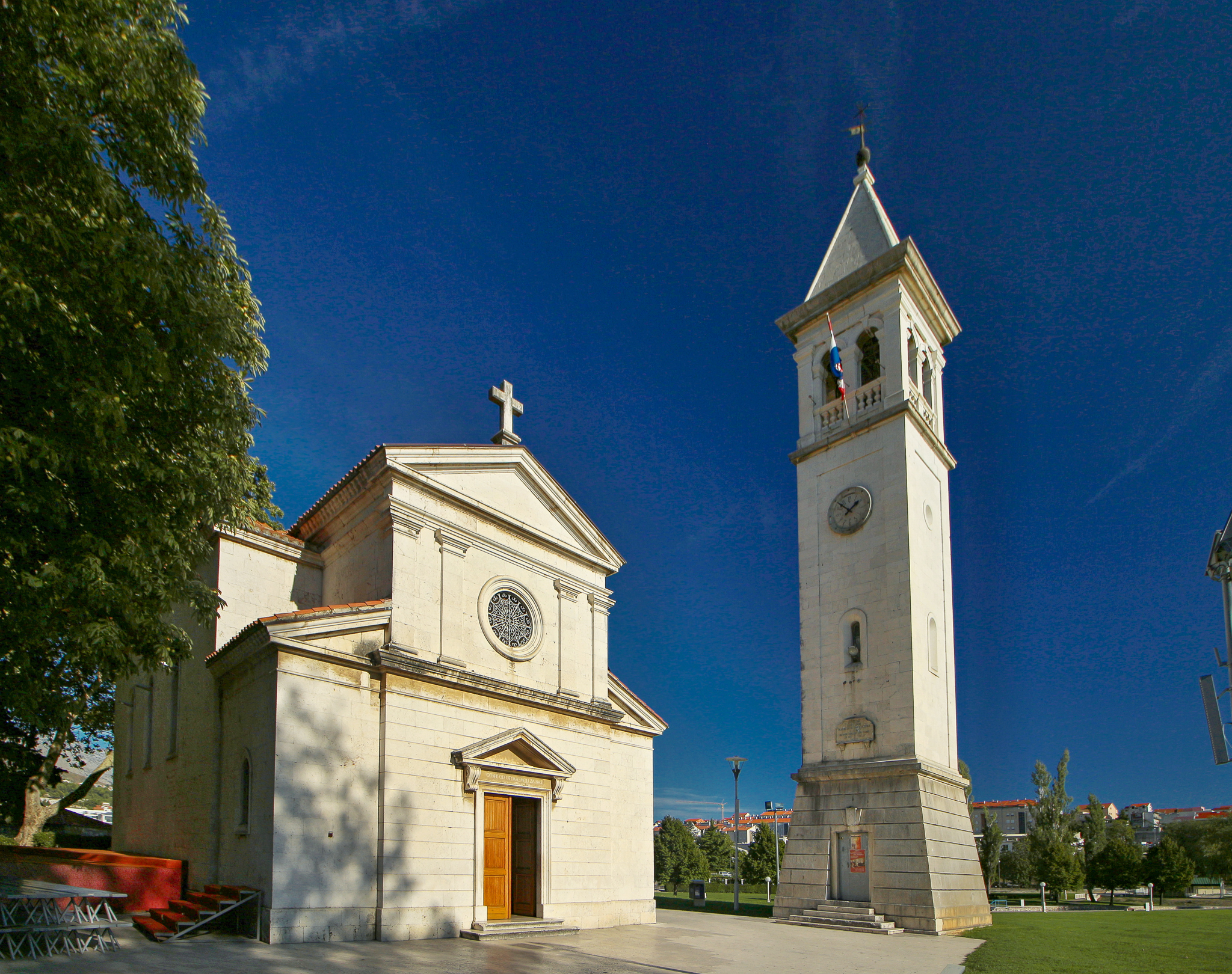 Město Solin u Splitu